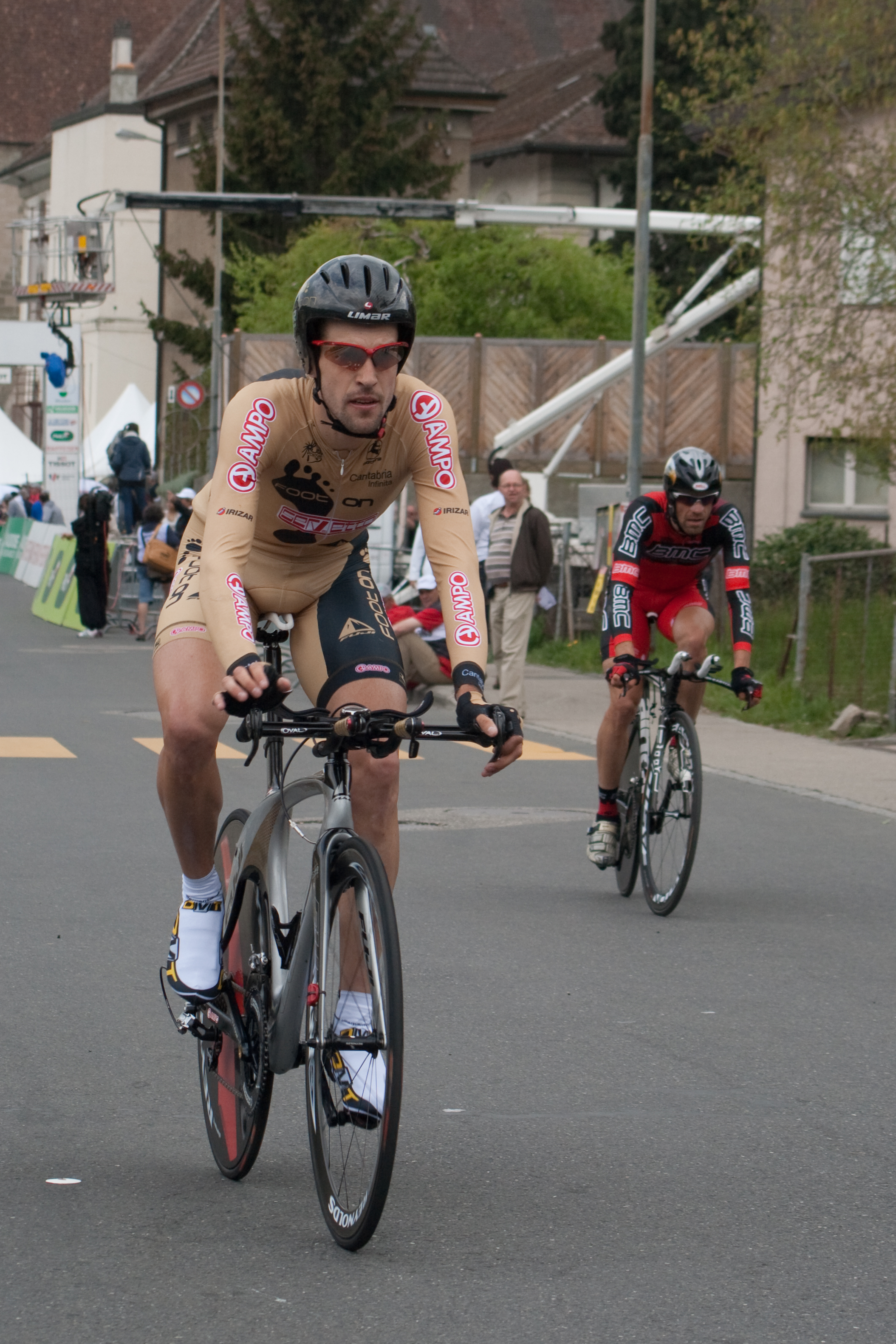 Markus Eibbegger, troisième étape du Tour de Romandie 2010.